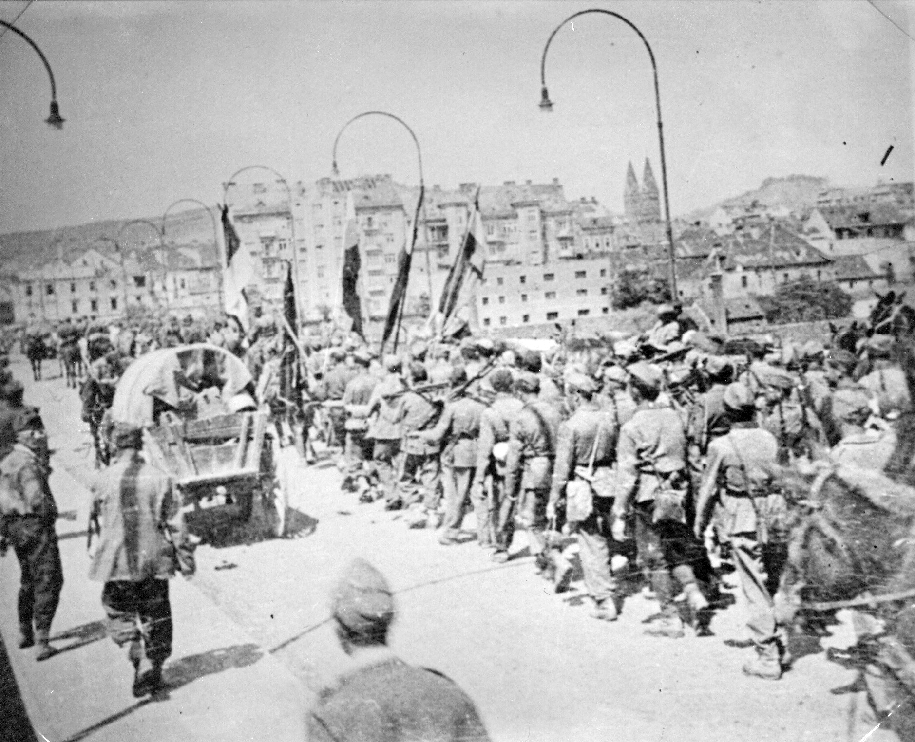 Enote 11. divizije v osvobojenem Mariboru.